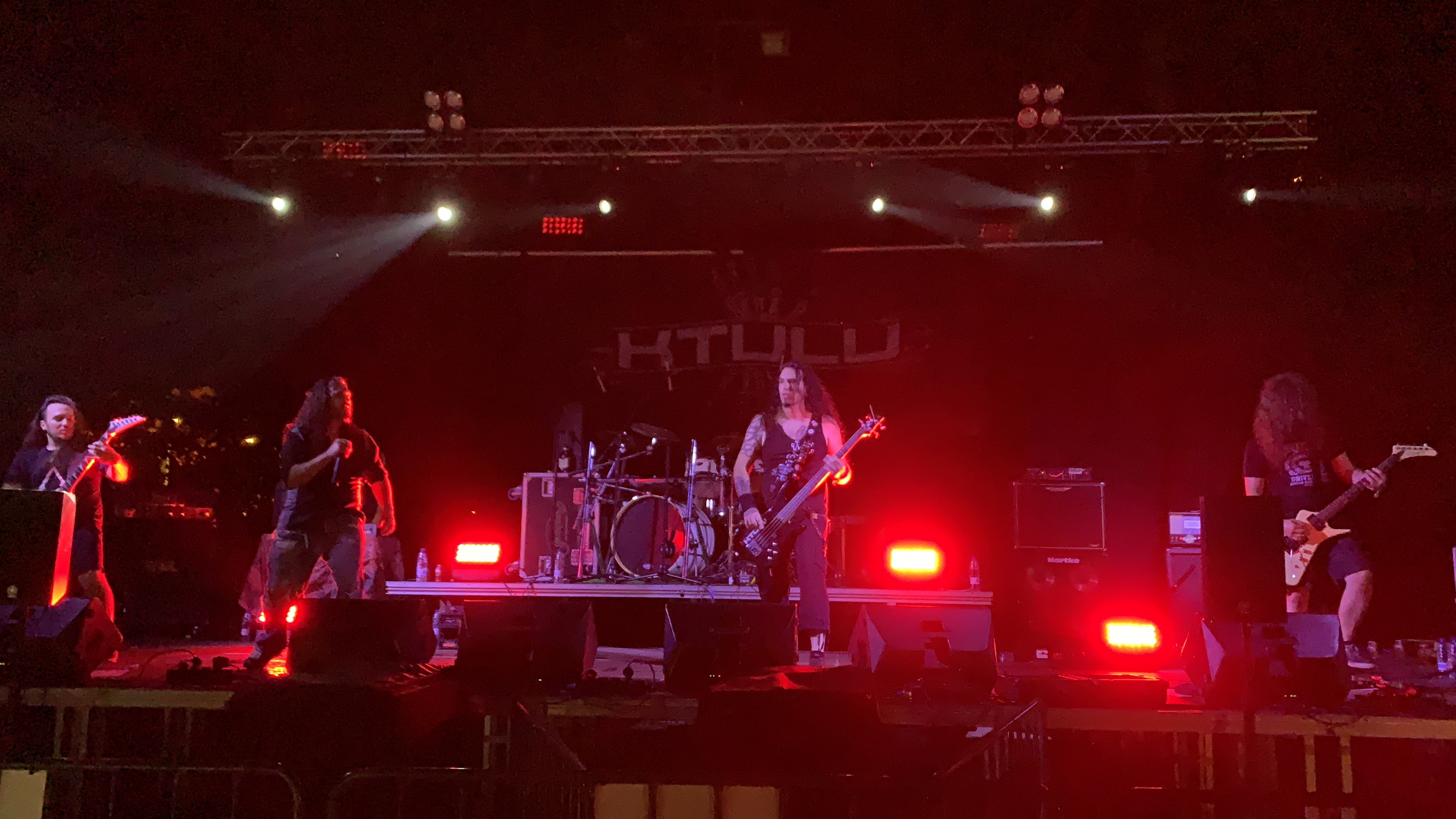 Actuación en directo de Ktulu en La Jonquera (21/07/2019)